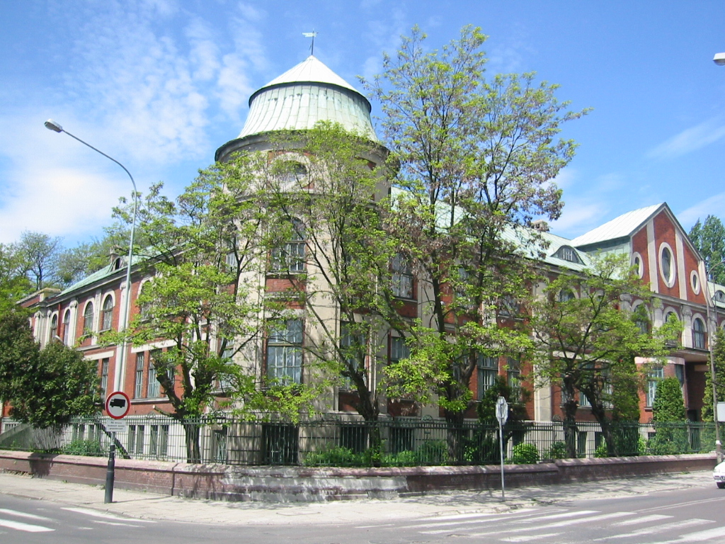 Centrala Handlowa z zespołu I Karola Wilhelma Scheiblera w Łodzi, obecnie wyższa uczelnia